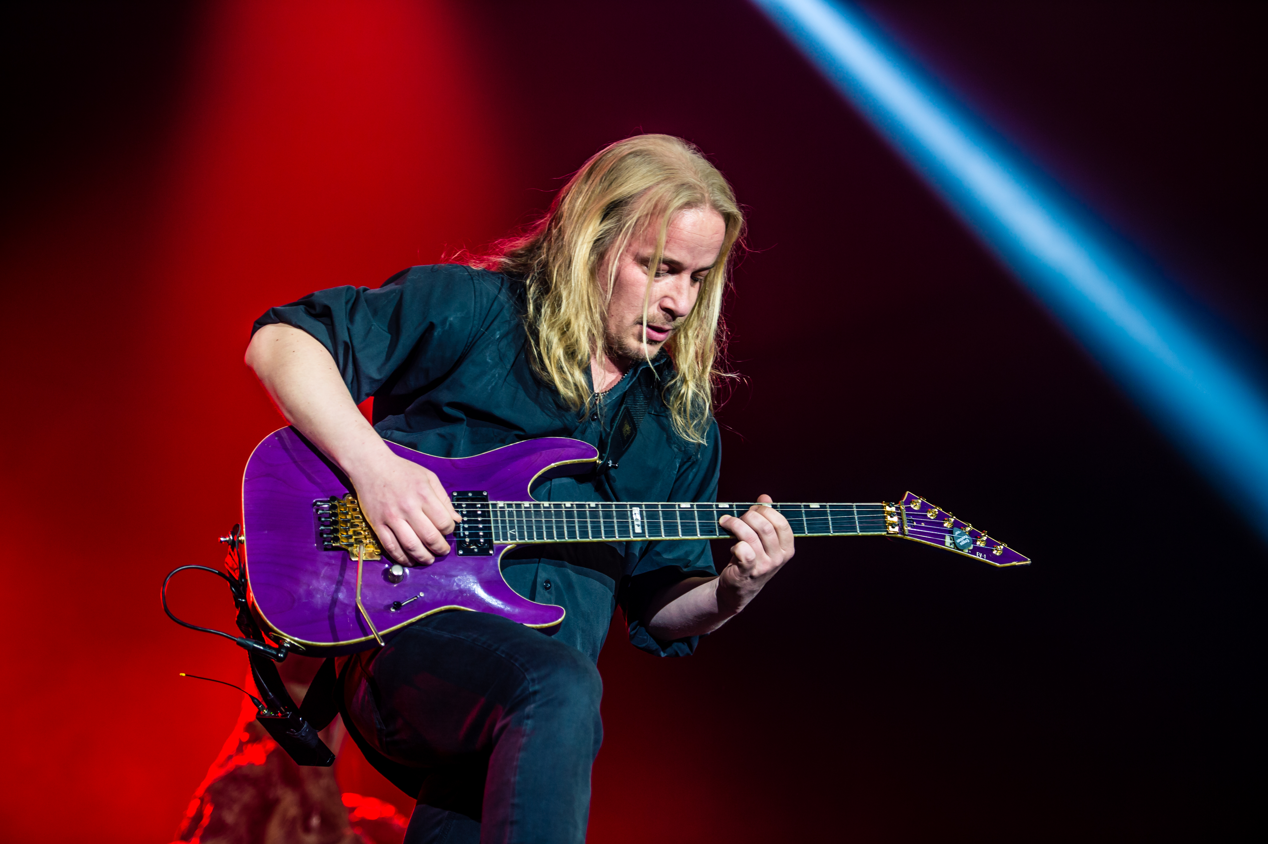 'Nightwish Endless forms most beautiful Tour 2015 Oberhausen'